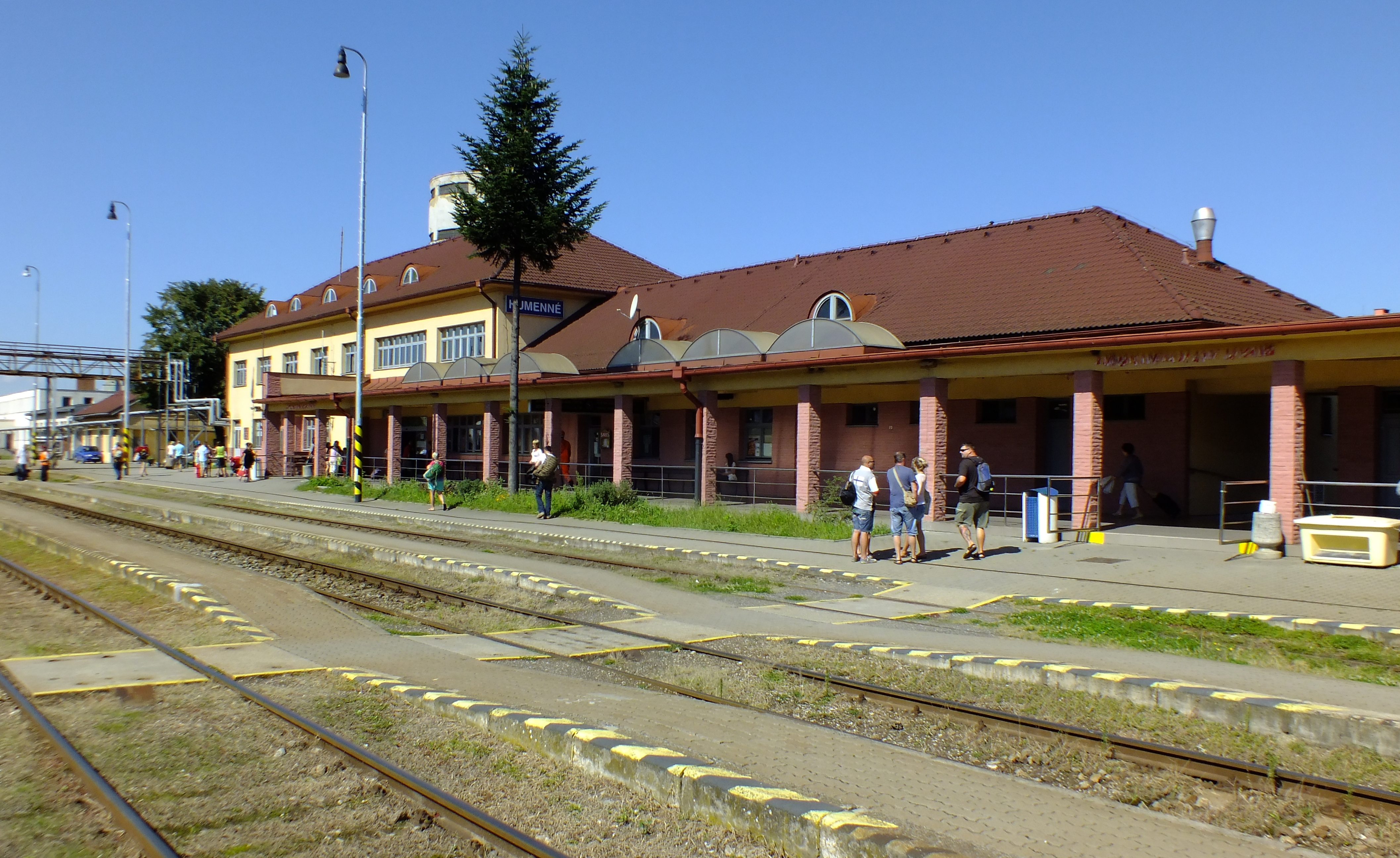 Staniční budova